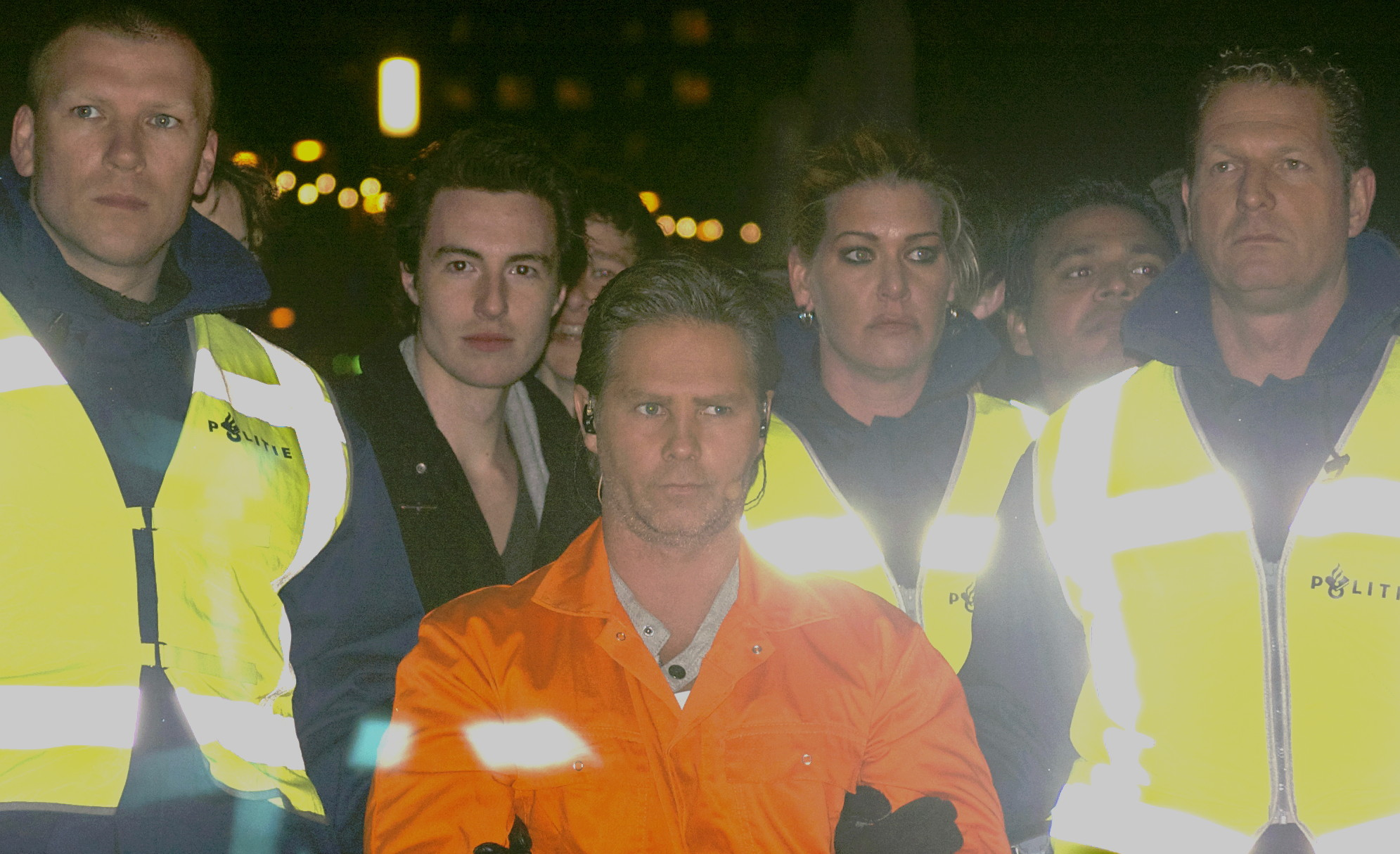 Danny de Munk (midden, oranje overall) speelde de bijbelse Jezus Christus van Nazareth in 'The Passion', een evenement dat in 2012 in de havenstad Rotterdam werd gehouden.